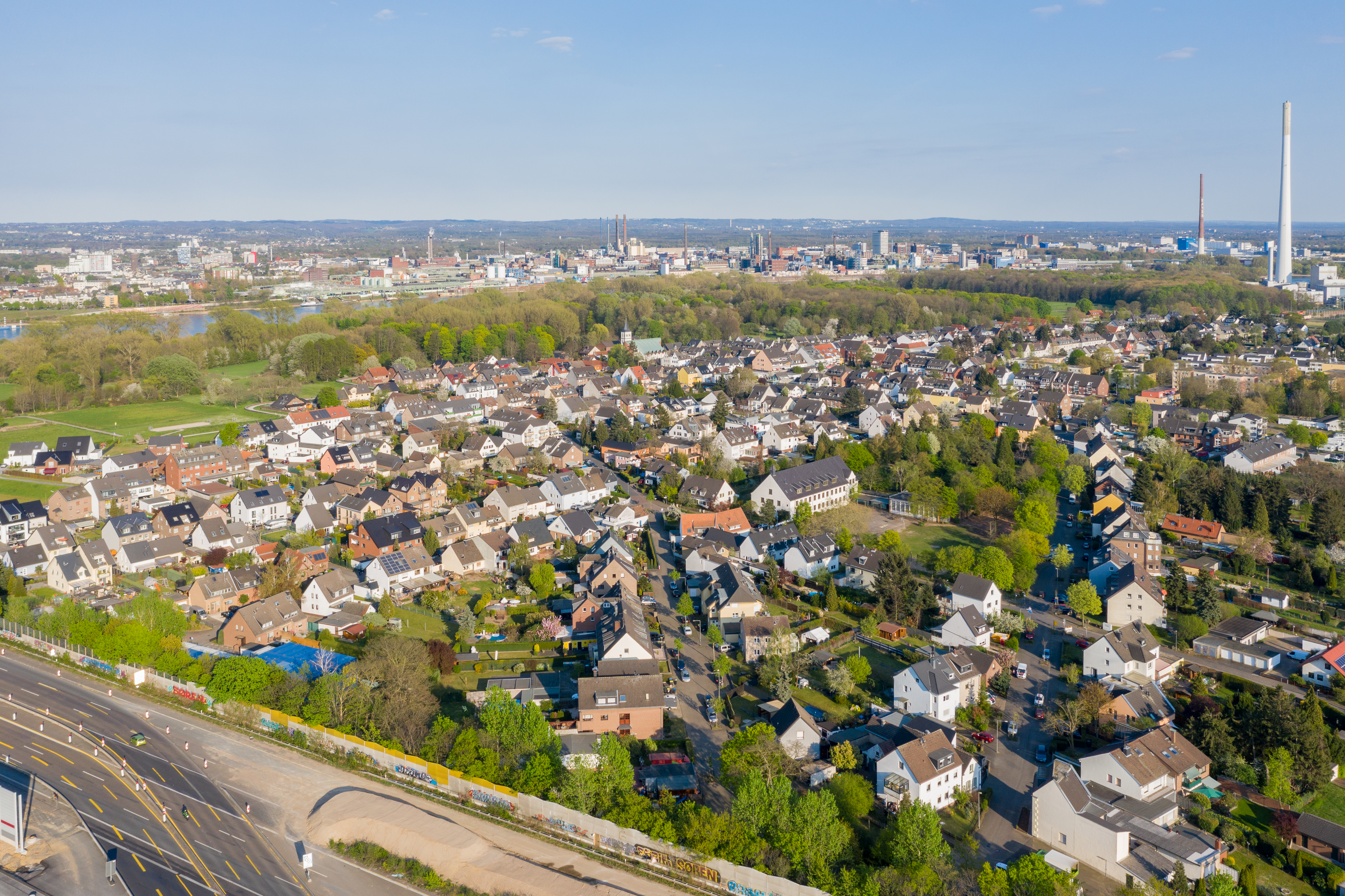 Köln-Merkenich - Luftaufnahme